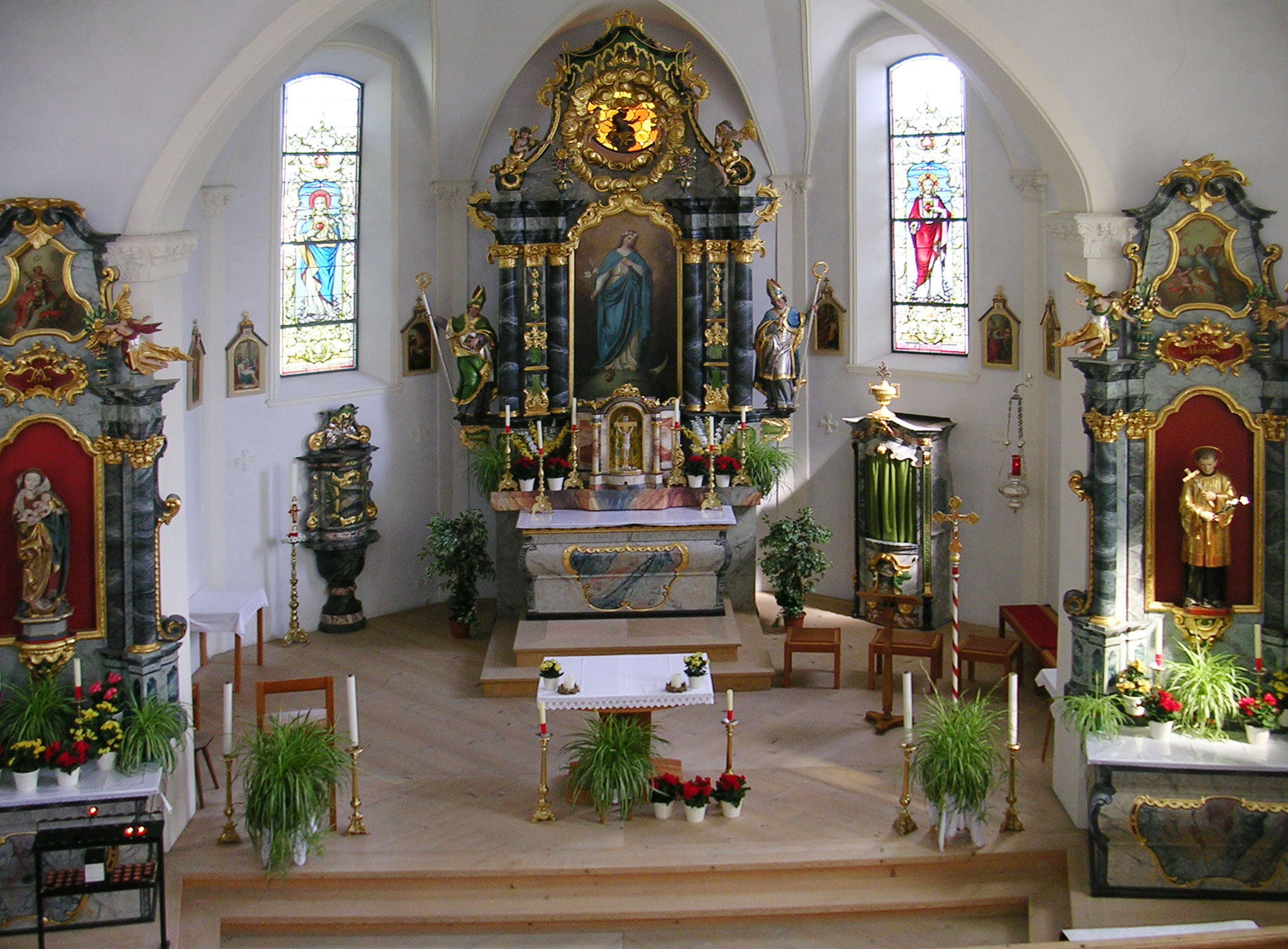 Kirche „Maria Empfängnis“ am Innerberg; Innenraum